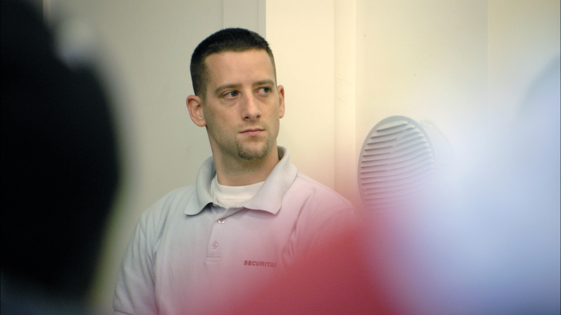 Sécuritas dans le réfectoire du centre d’enregistrement et de procédure pour requérant d’asile de Vallorbe. Image tirée du film « La forteresse » de Fernand Melgar